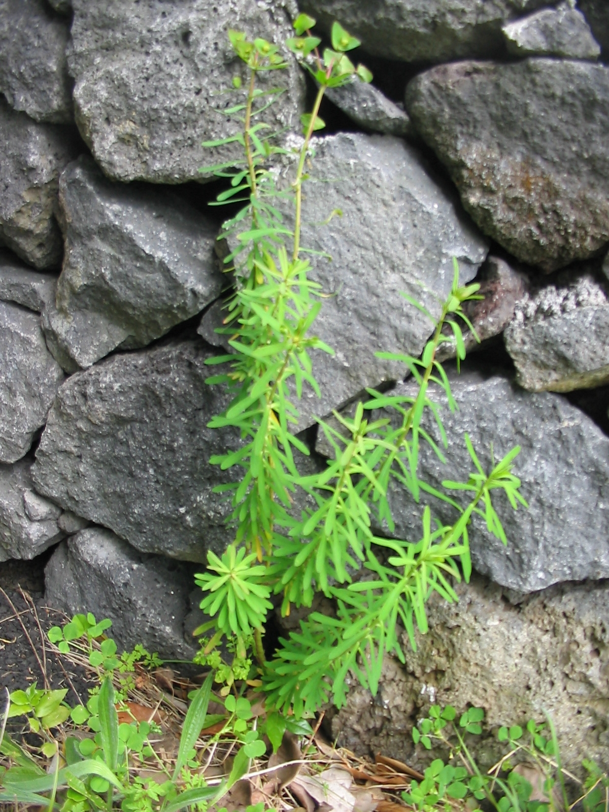 Azoreanische Wolfsmilch (Euphorbia azorica) - Habitus